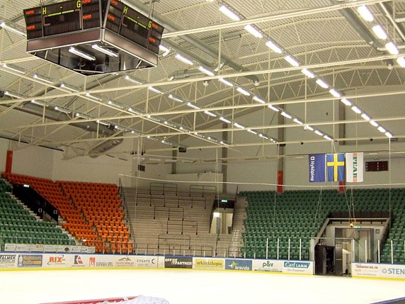 en bild på Peab arena